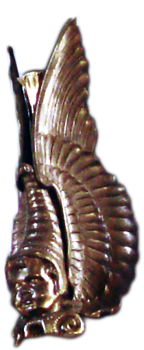 Engelskopf (freigestellt) an einer der Altmessingtafeln des Prospekts der Strebel-Orgel